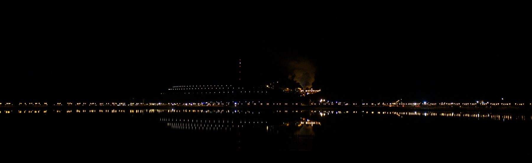 Mina de ferro de la LKAB a Kiruna. Vista nocturna del conjunt